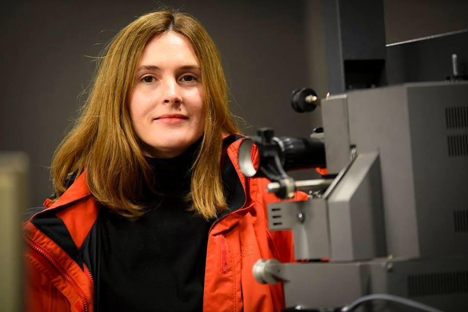 Laida Lertxundi. Zinemagilea eta unibertsitateko irakaslea